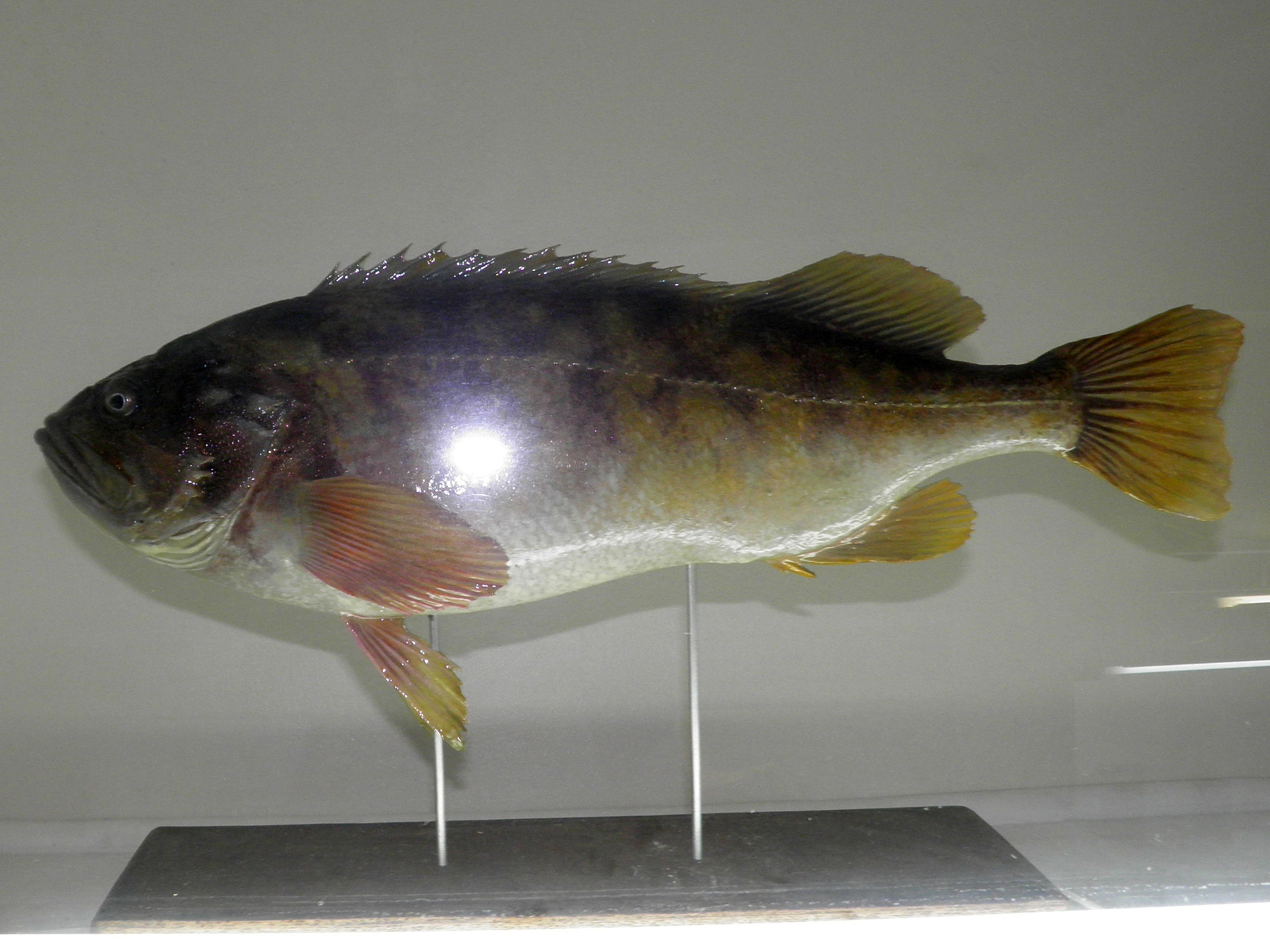 Sebastes glaucus в океанариуме Владивостока